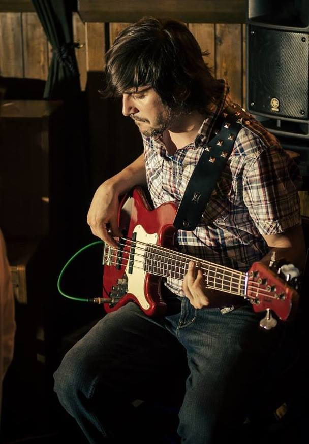 Michael Krásný